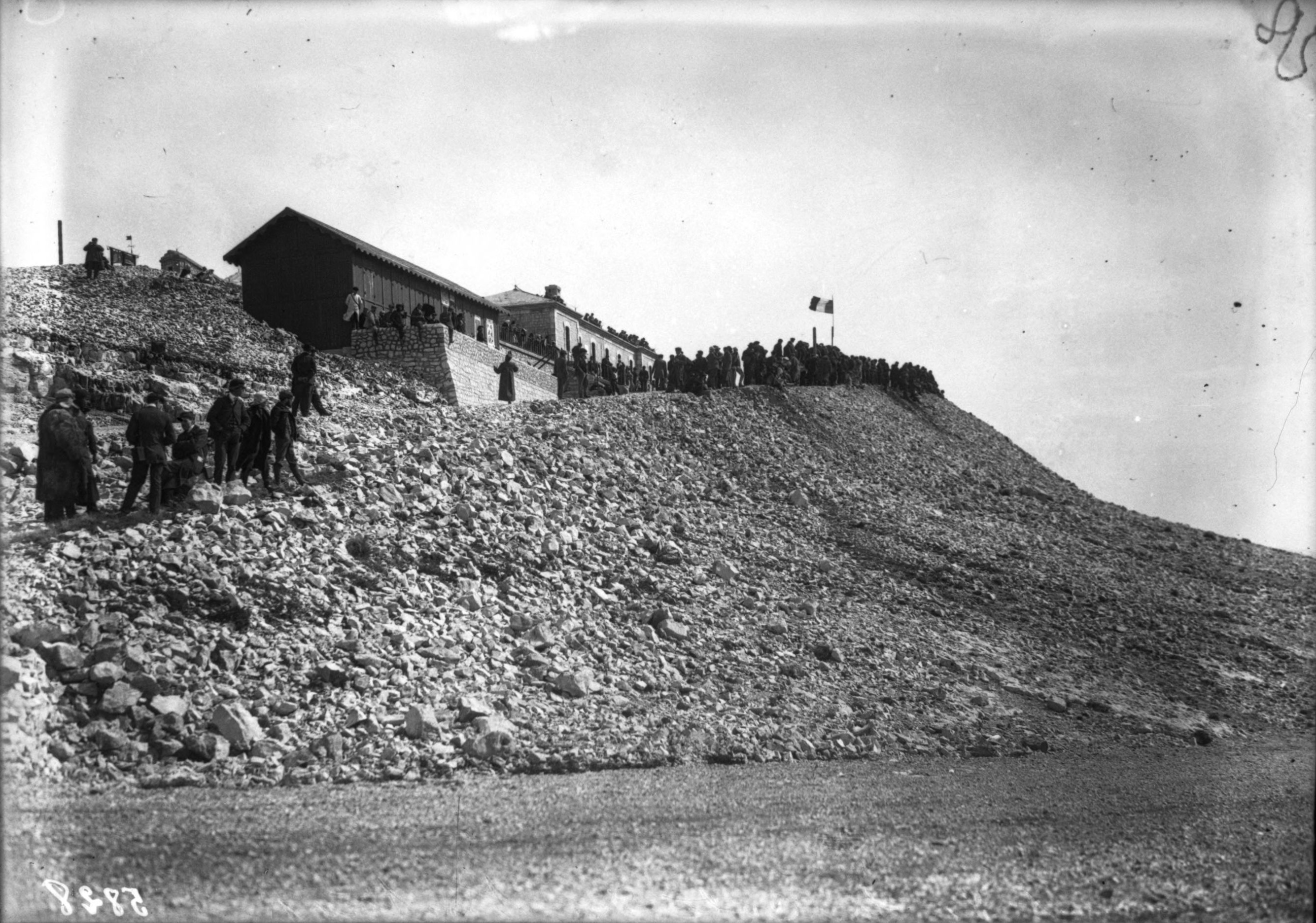 Spectateurs attendant les concurrents d'une course automobile au sommet du Mont Ventoux, en 1906